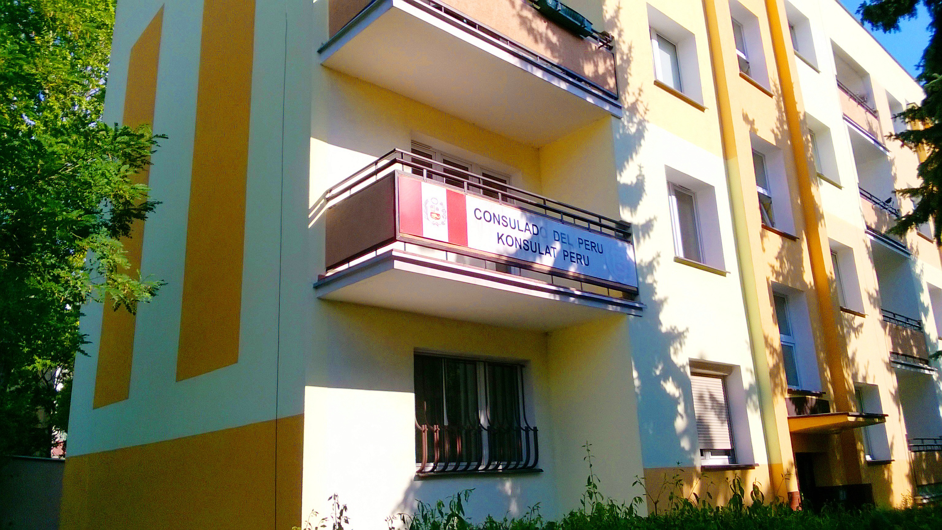 Konsulat Honorowy Peru w Toruniu